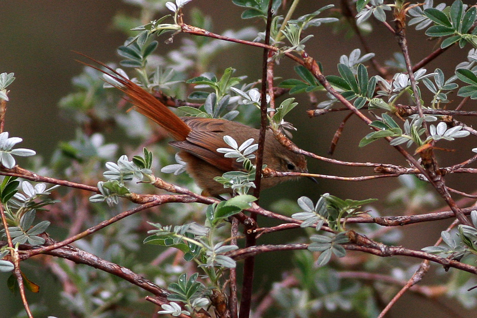 Yavi to St Victoria to Yavi